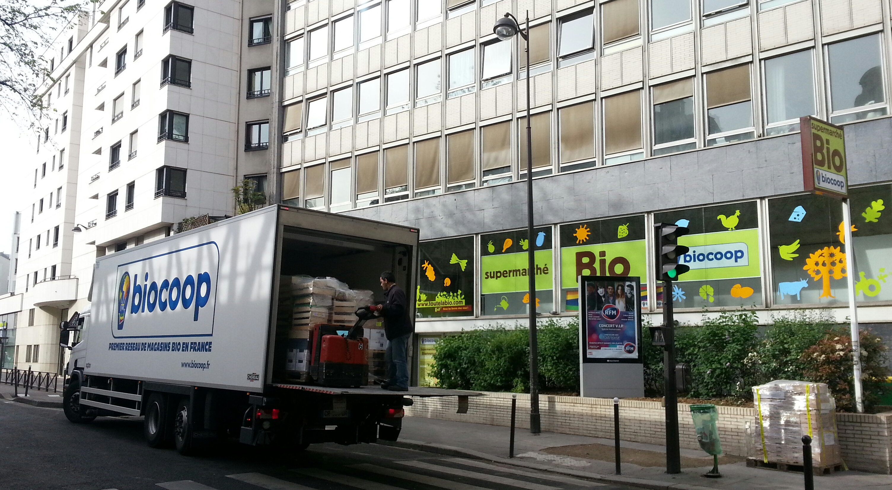 Déchargement d'un camion de livraison Biocoop pour approvisionnement du magasin Biocoop du boulevard Grenelle à Paris